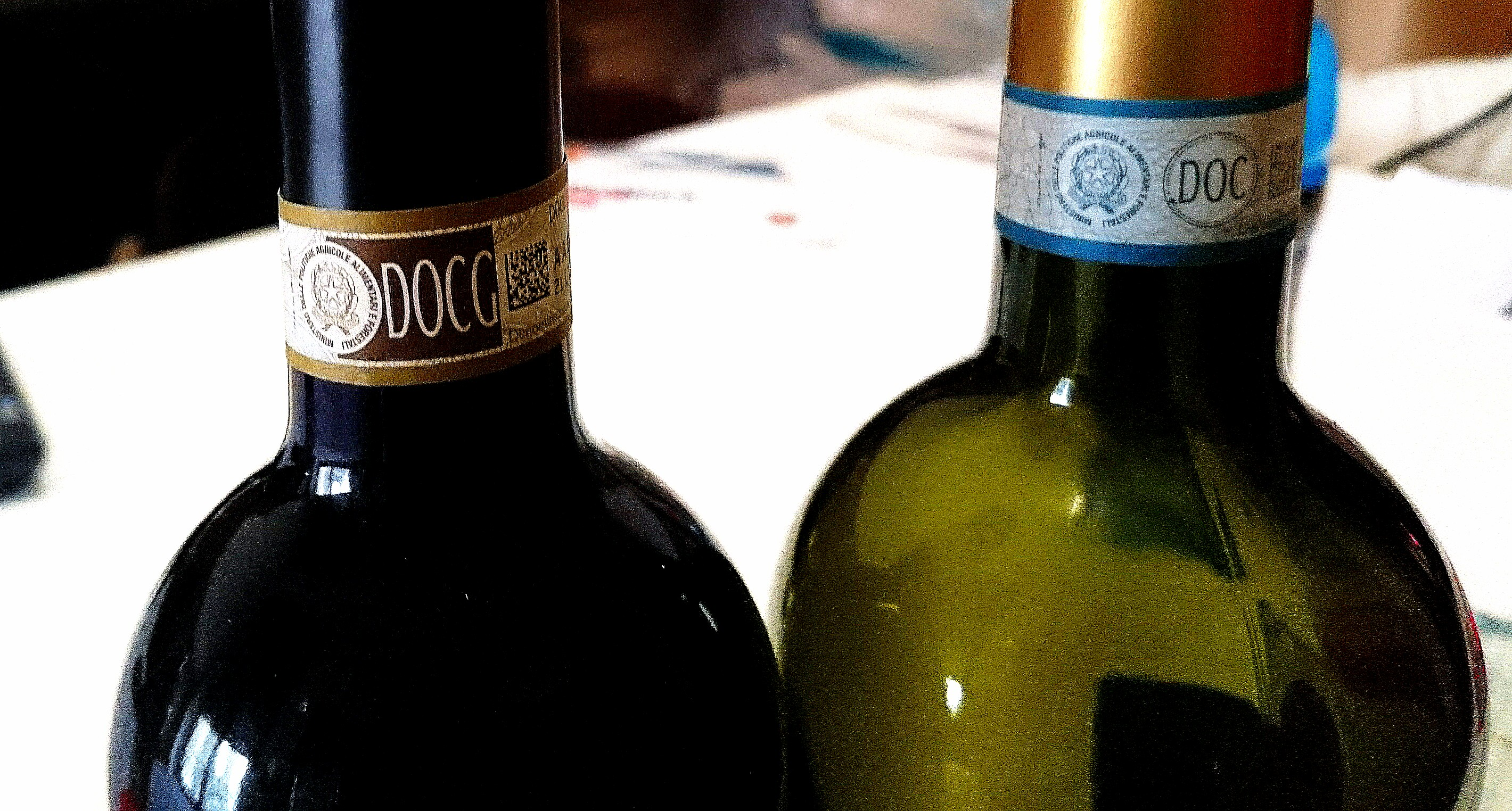 marchi ministeriali DOCG e DOC